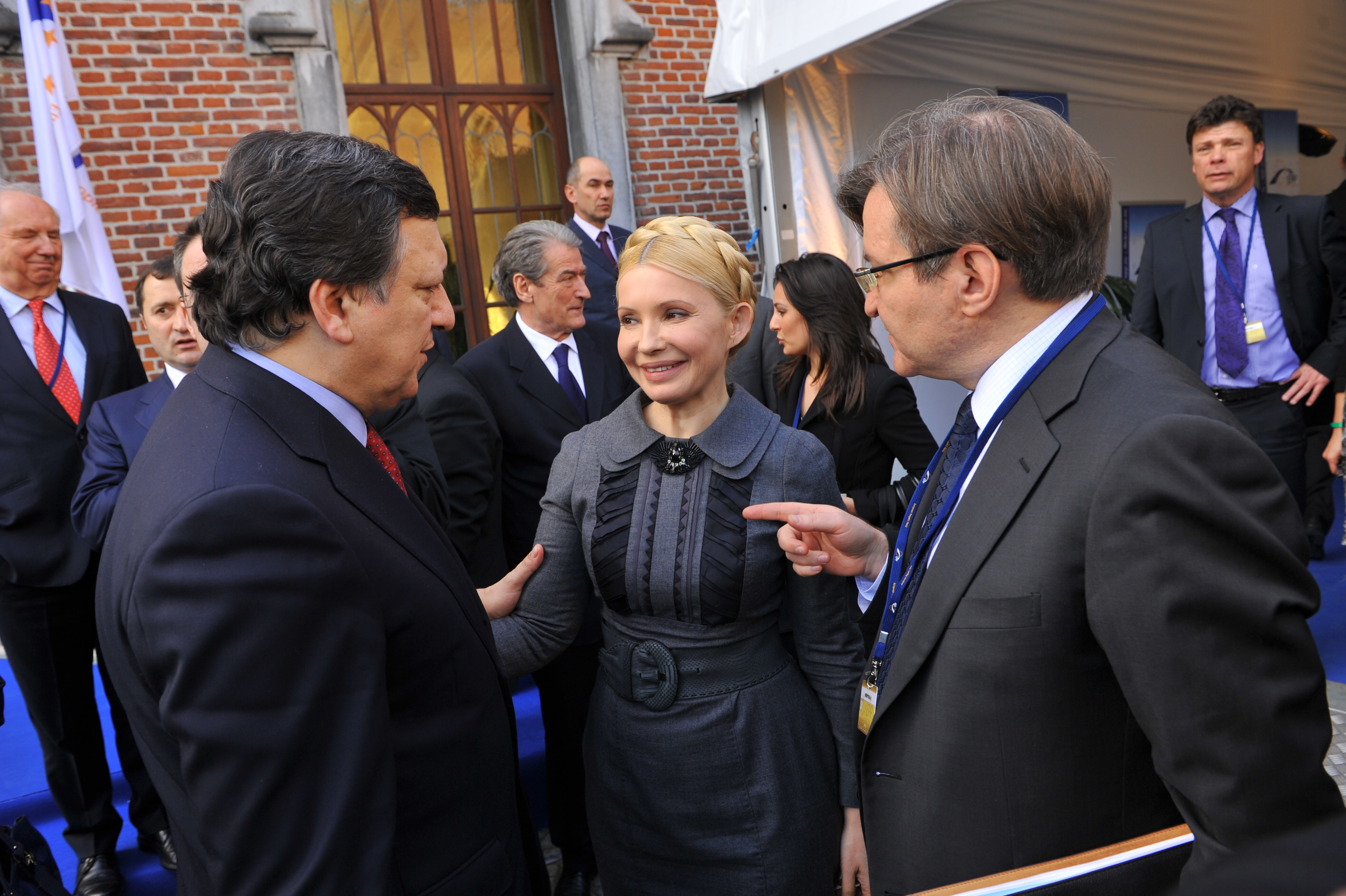 Yulia Tymoshenko, José Manuel Barroso